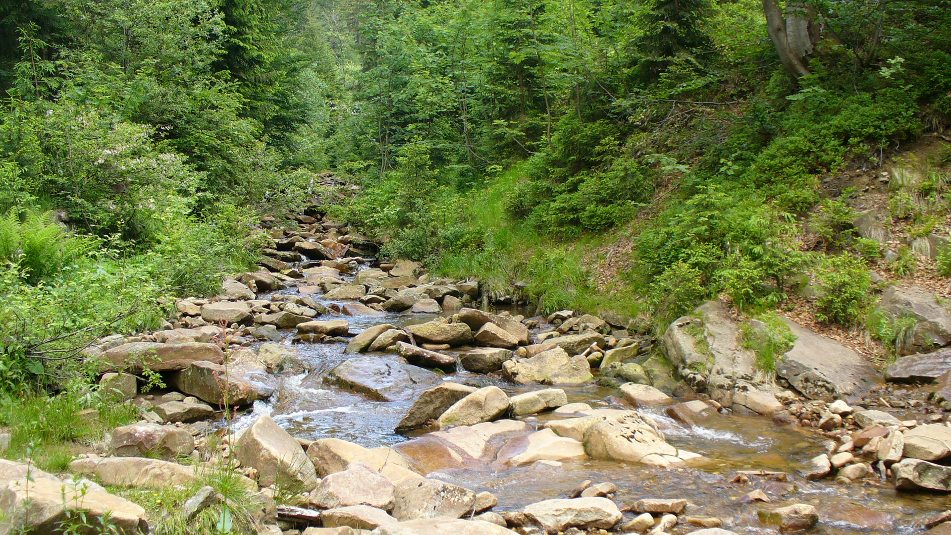 Czarna Wisełka w Wiśle